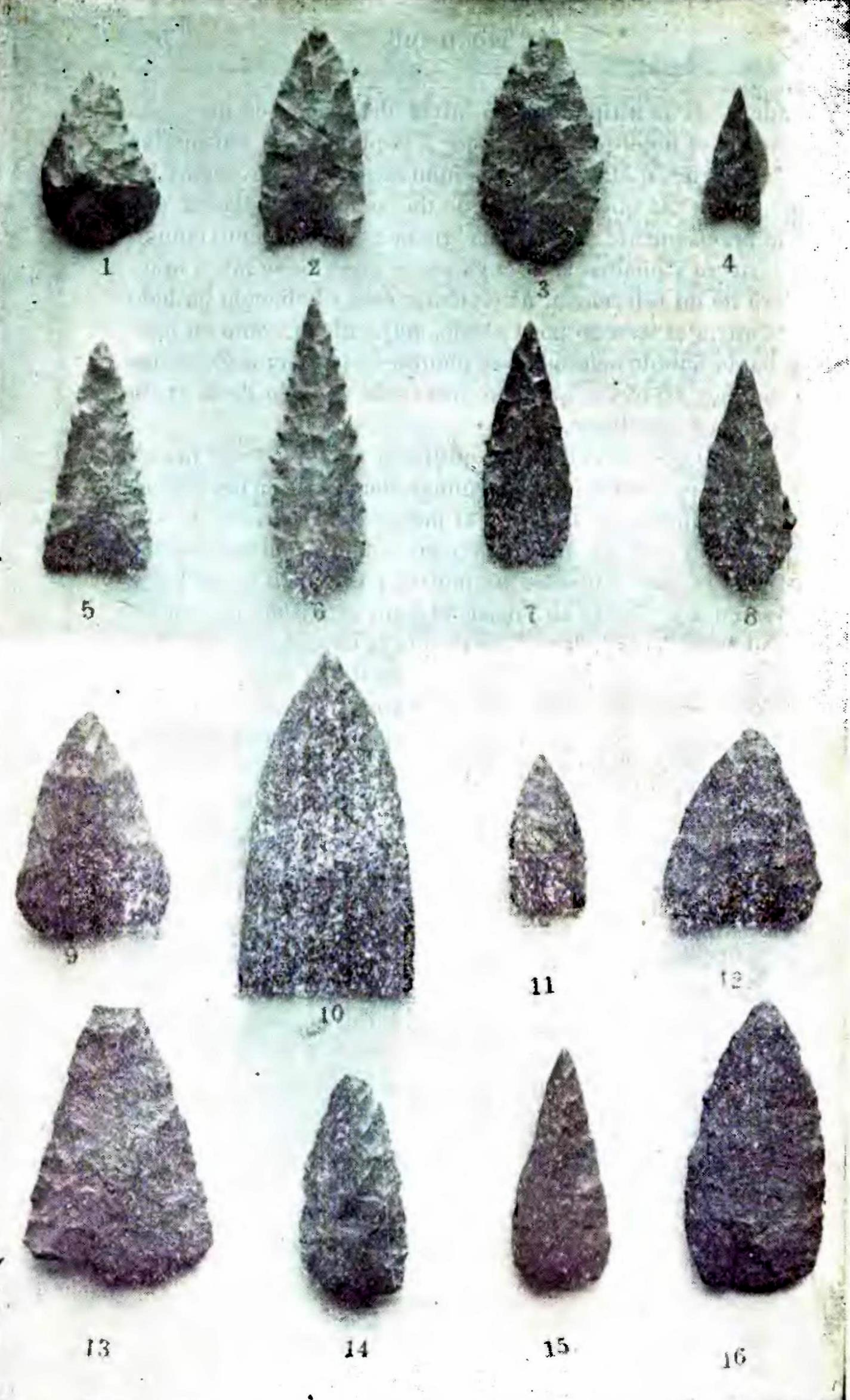 Sheet on "Los Restos Indígenas de Pichilemu" (1908) page 11.